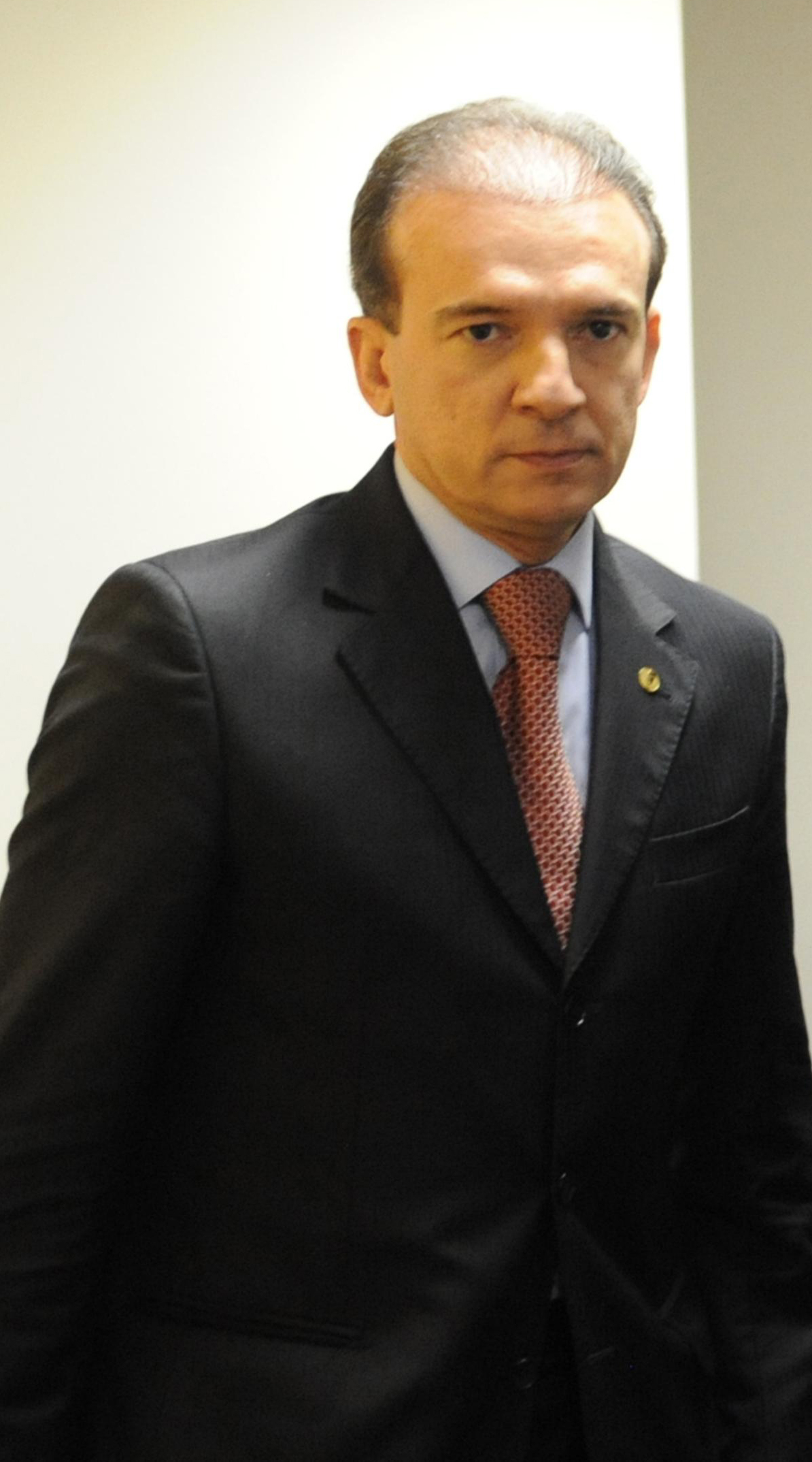 Brasília – O ministro da Educação, Fernando Haddad encontra-se com o presidente da Ordem dos Advogados do Brasil (OAB), Ophir Cavalcante para dar explicacoes sobre a falha no Enem (Wilson Dias/ABr)